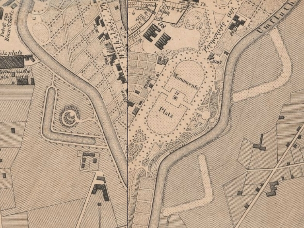 Der neue Verlauf der Umflutgräben und die alten Seitenarme nach der Schleifung der Stadtbefestigung. Plan von 1844.